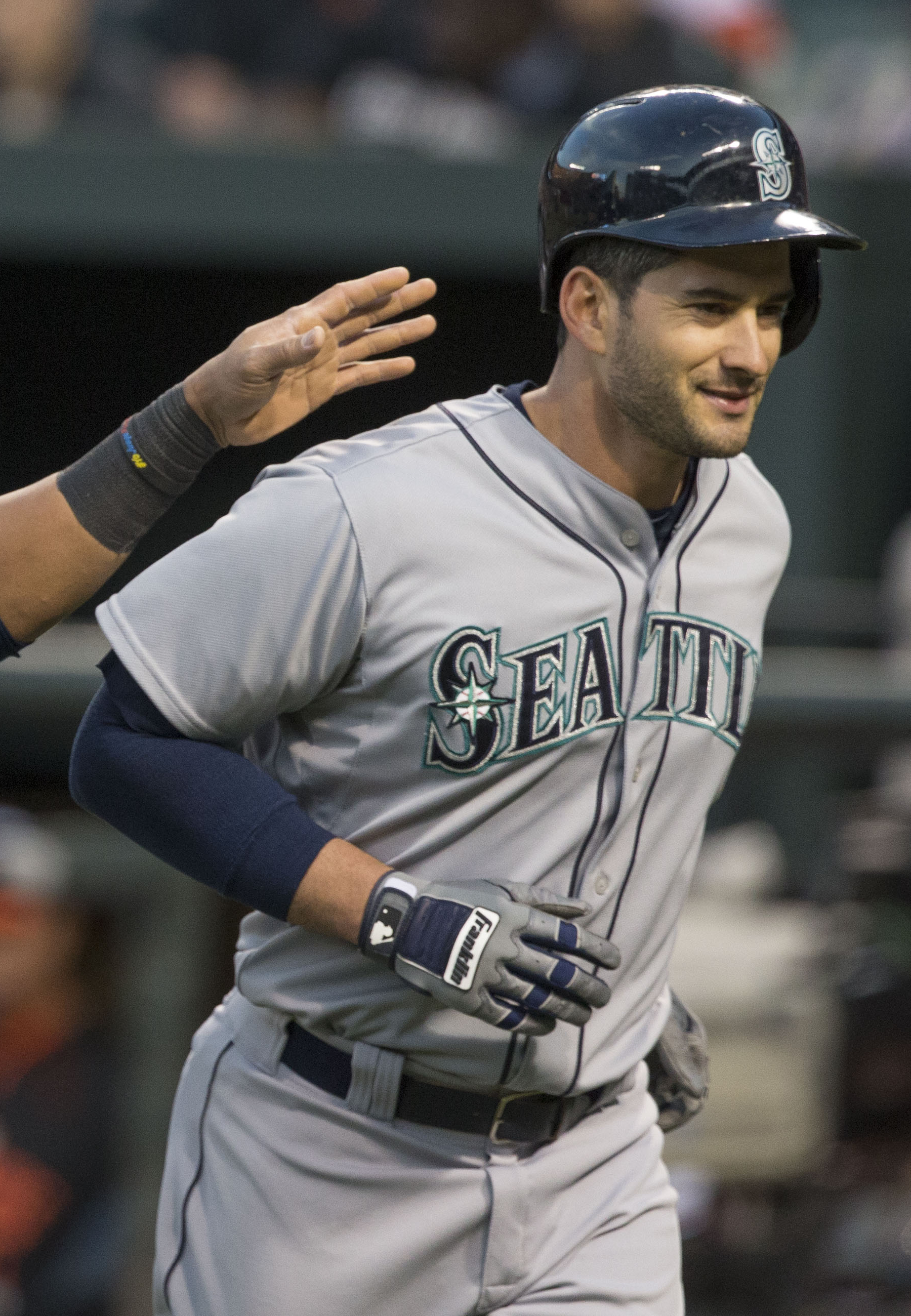 Justin Ruggiano